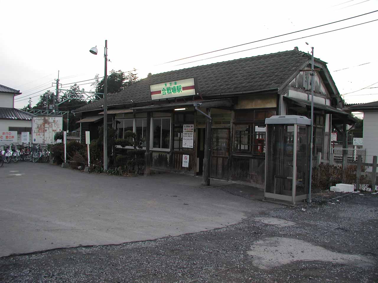 Tobu Nikko Line Kassenba station in 2001.